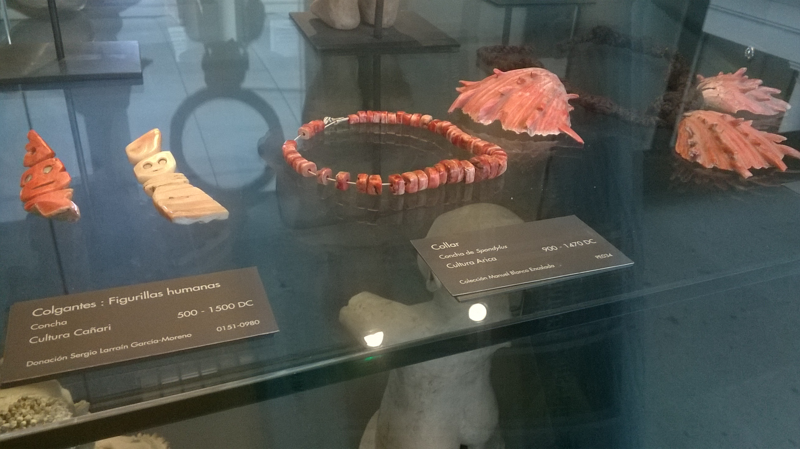 Ornements précolombiens (collier, boucles d'oreilles) faits de spondyles, avec deux coquillages de ce genre (Spondylus). Eposition permanente du Musée chilien d'art précolombien (Santiago du Chili)